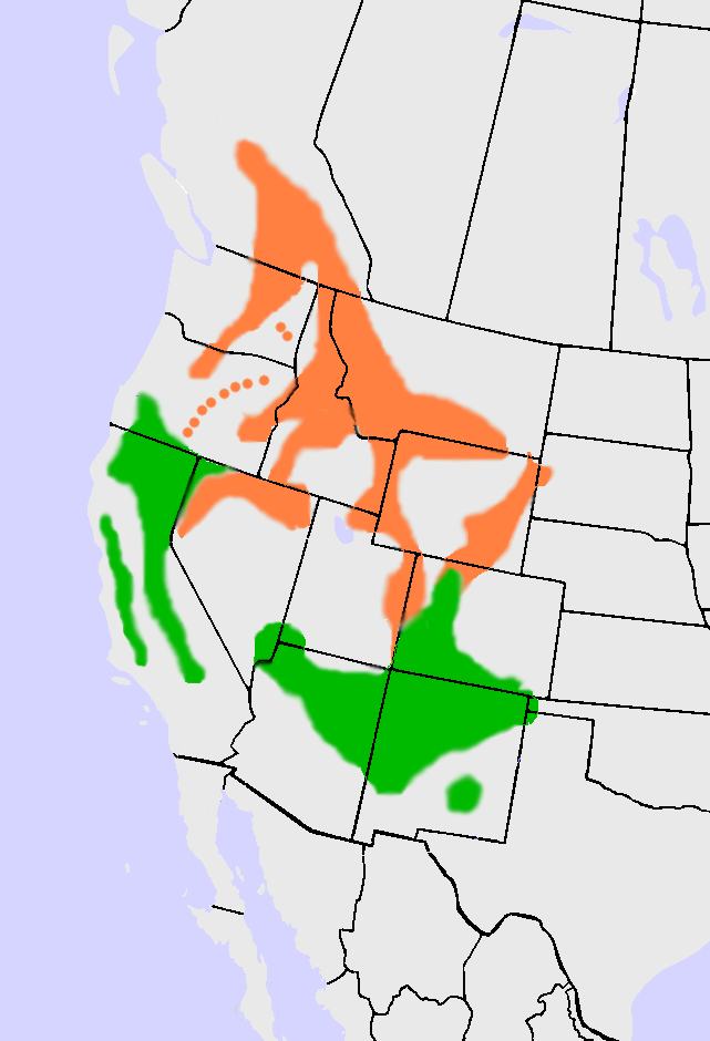 Melanerpes lewis Range Map